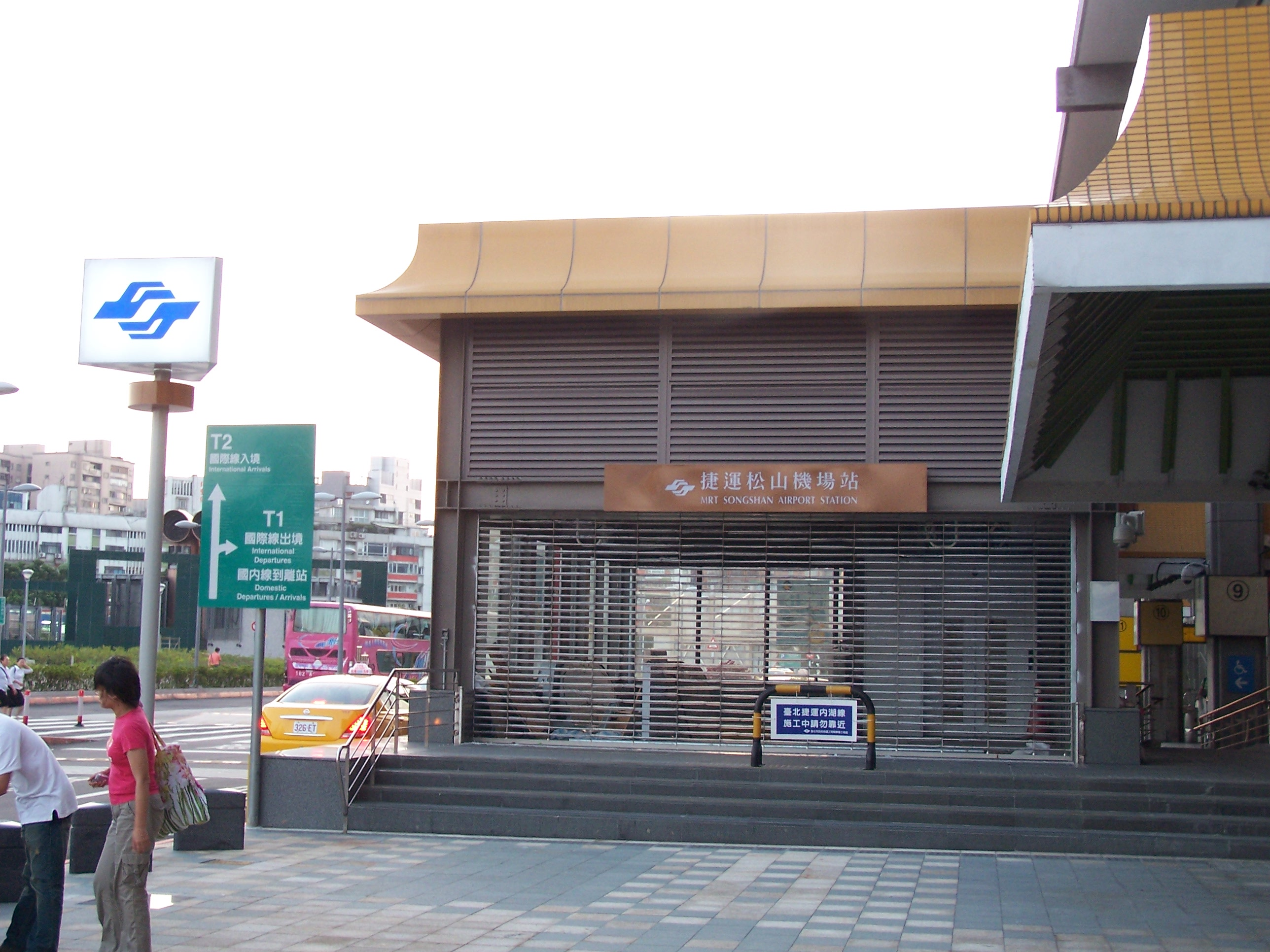 啟用前的臺北捷運松山機場站1號出口。